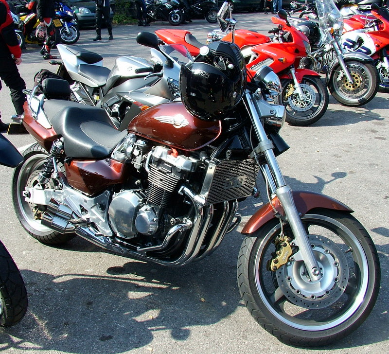 Honda X-4